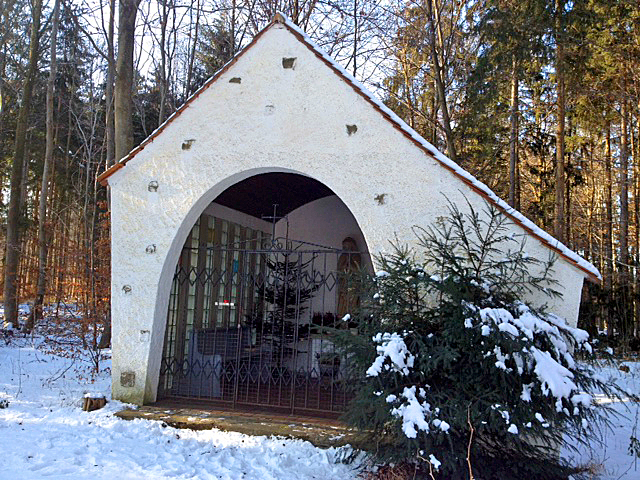 Waldkapelle in Geltendorf/ Bayern/ Deutschland